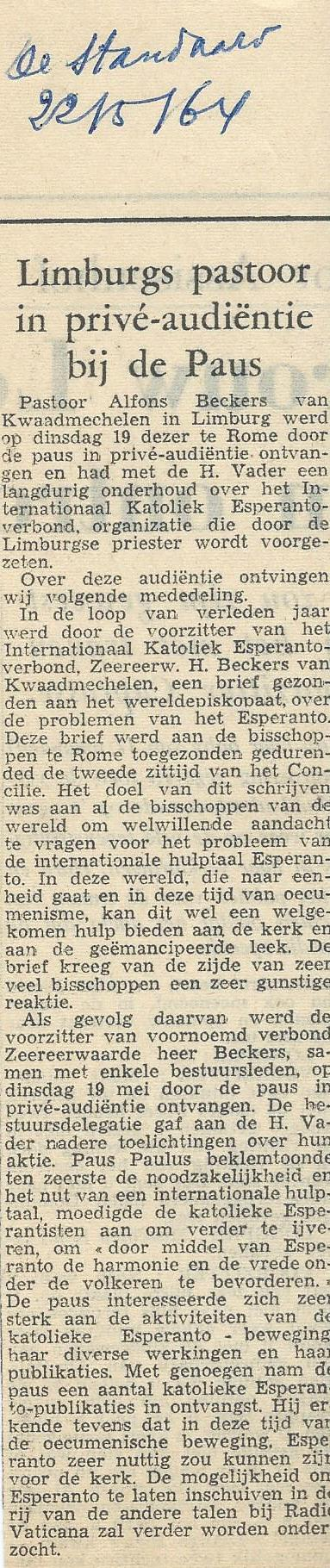 Artikolo en taggazeto "De Standaard" pri Alfons Beckers, 1964-05-22